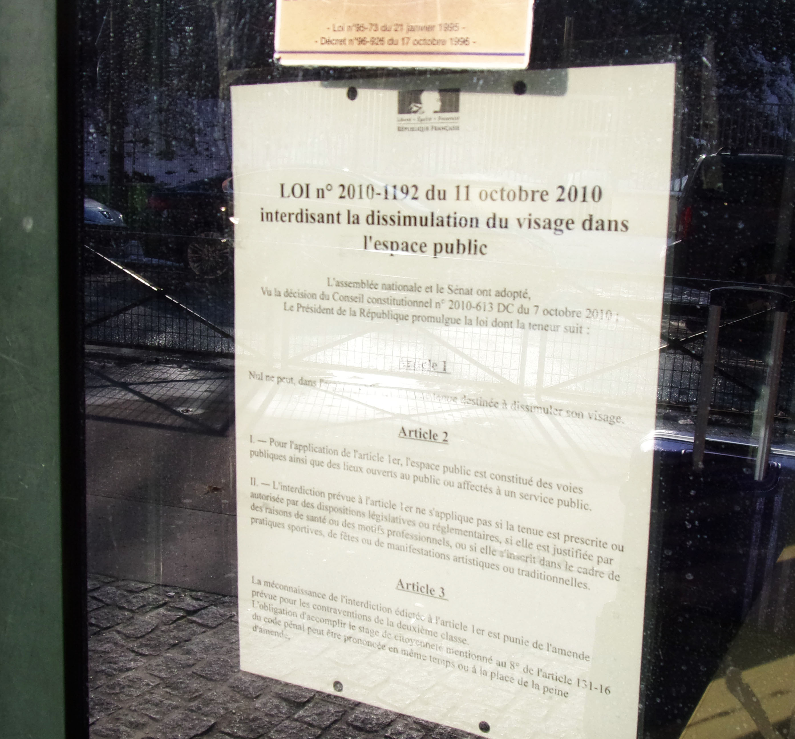 Affiche apposée sur un bâtiment public et faisant état de la loi du 11 octobre 2010.